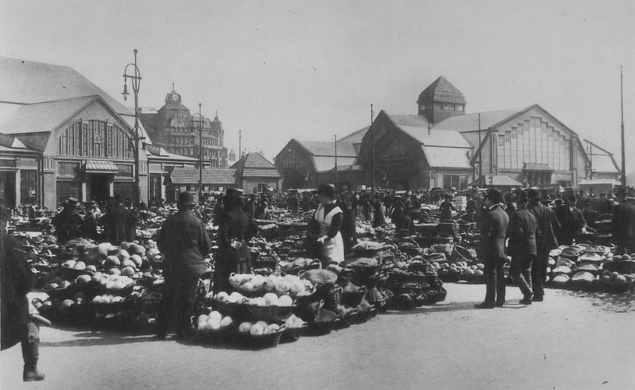 Die Deichtorhallen des Großmarktes Hamburg in Hamburg-Altstadt This is the photograph of an architectural monument. It is part of the list of cultural monuments of Hamburg, no. 1075